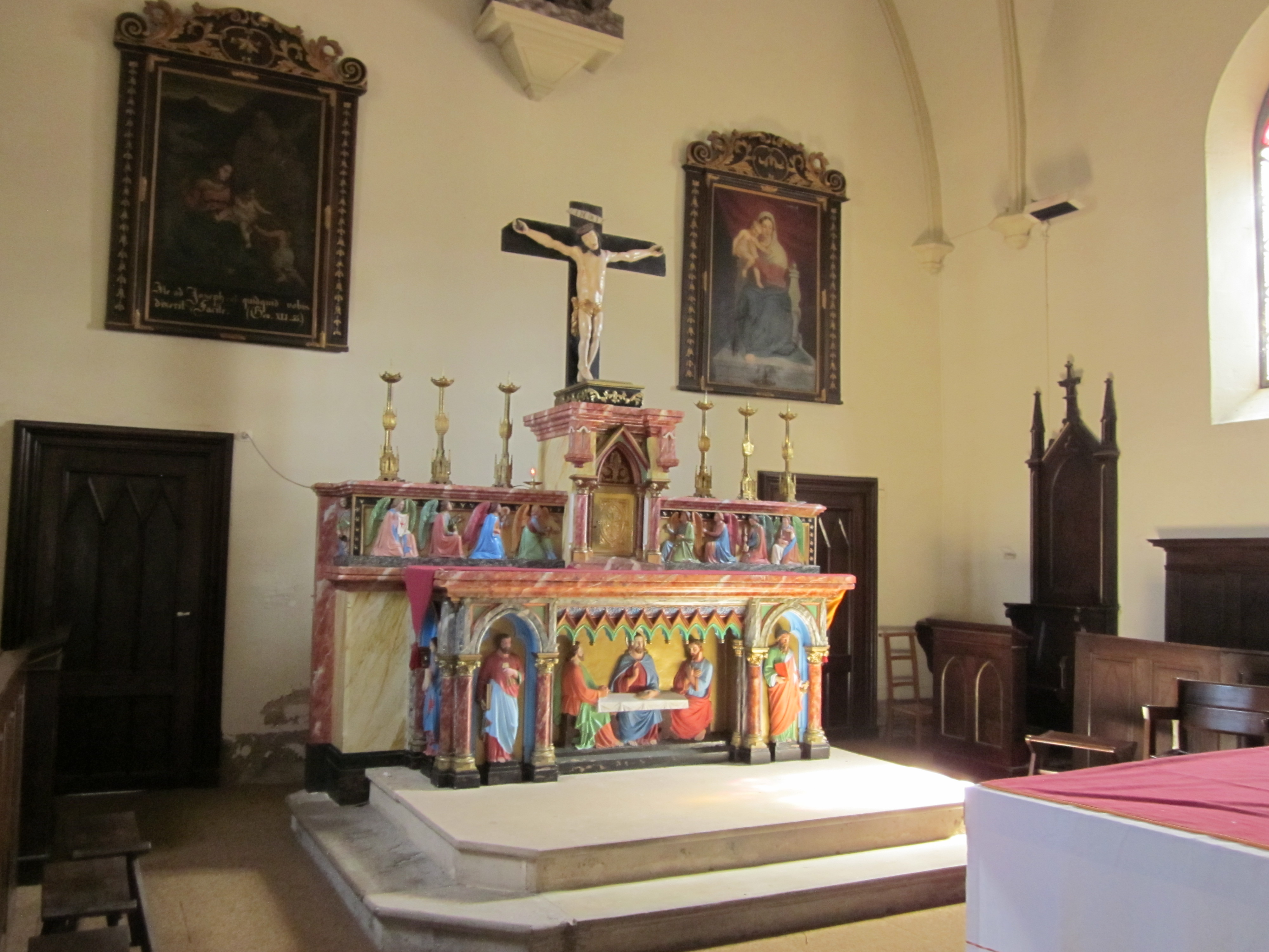 Vannoz (Jura) - église - autel